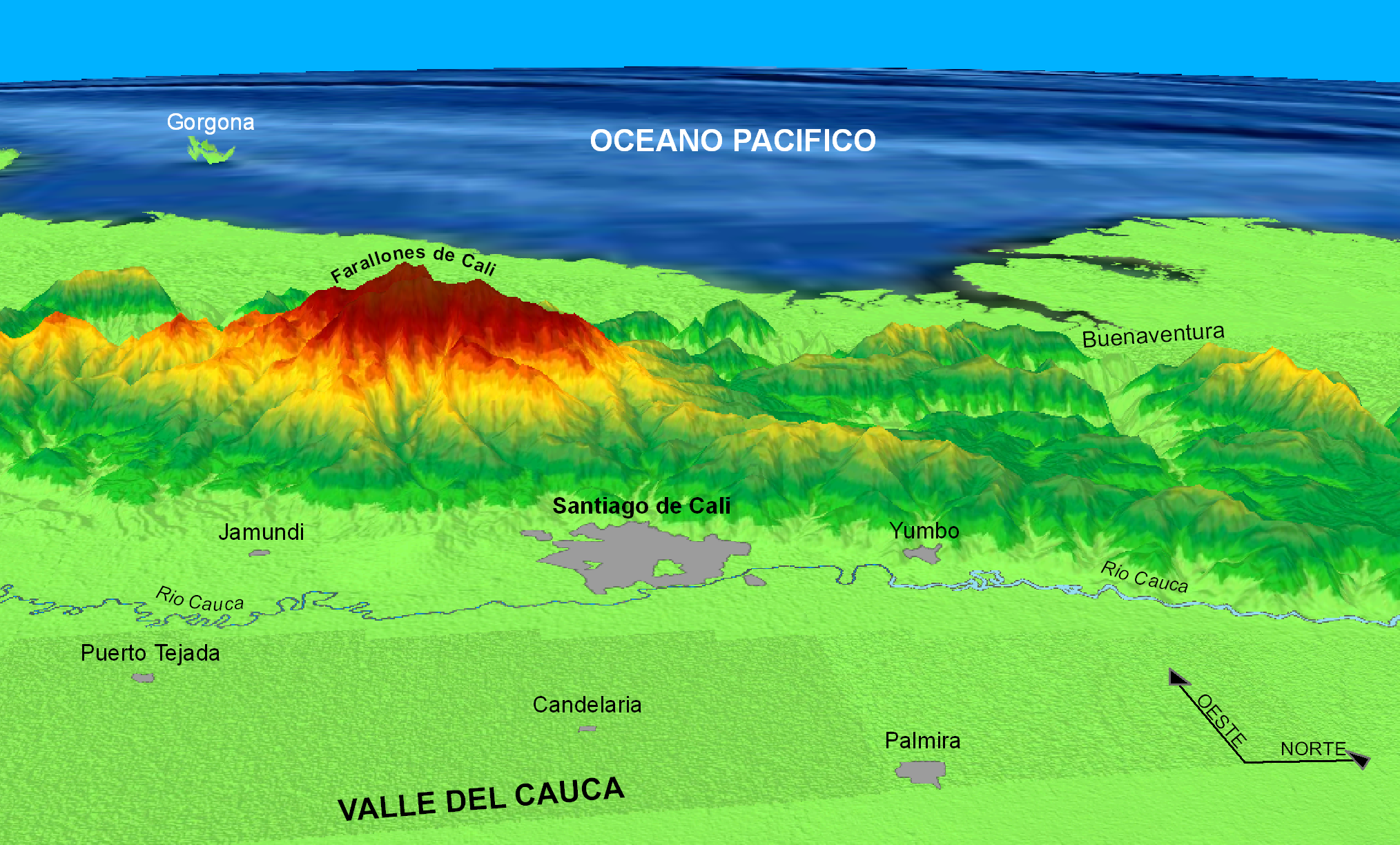 Ubicacion Cali en el Valle del Cauca, Colombia, Vista 3D desde el Este. Las montañas han sido exageradas en un factor de 4.25.